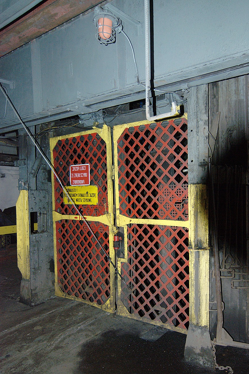 Szyb Staszic. Wrota na poziomie zrębu szybu.